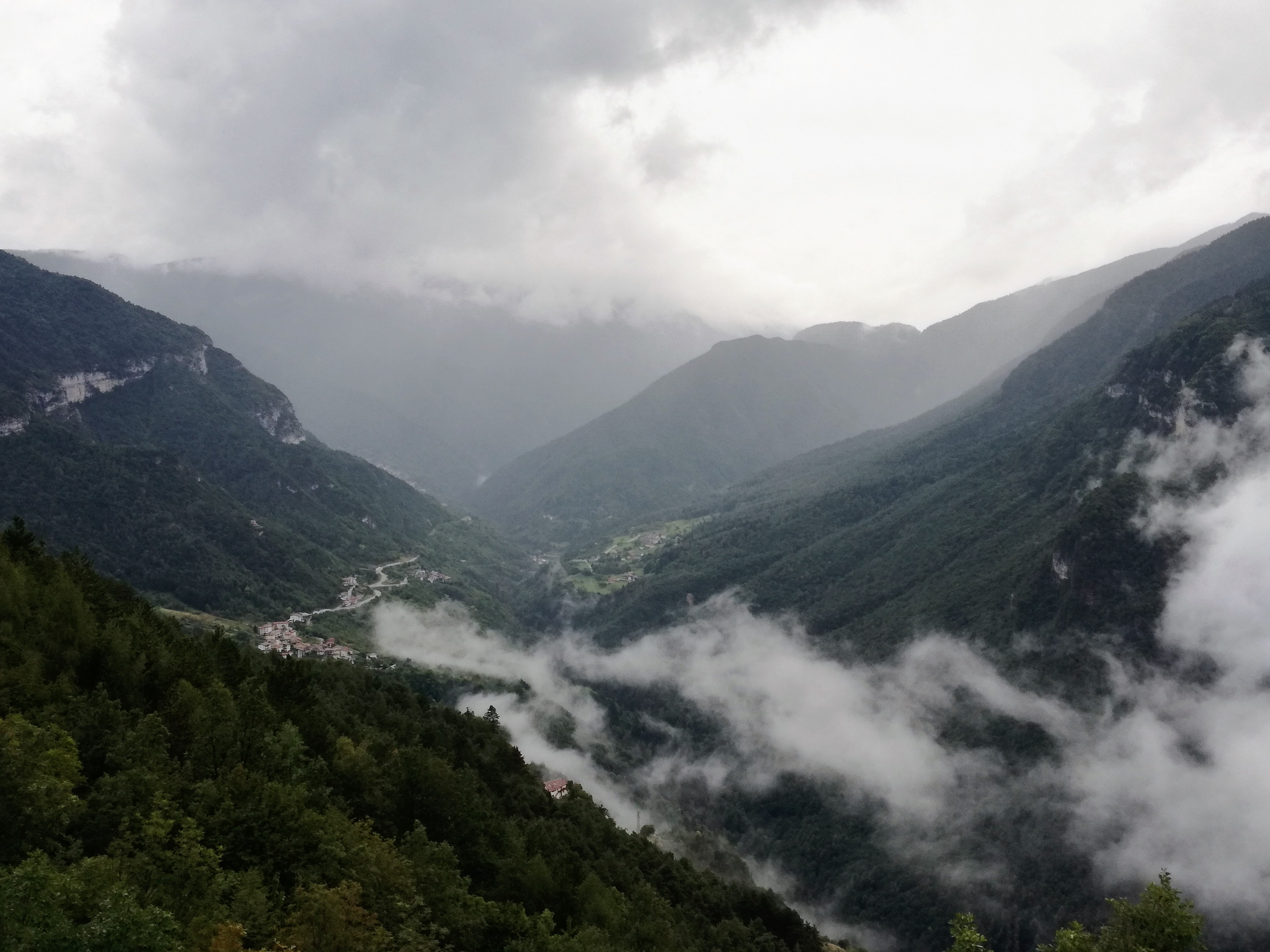 Val Terragnolo